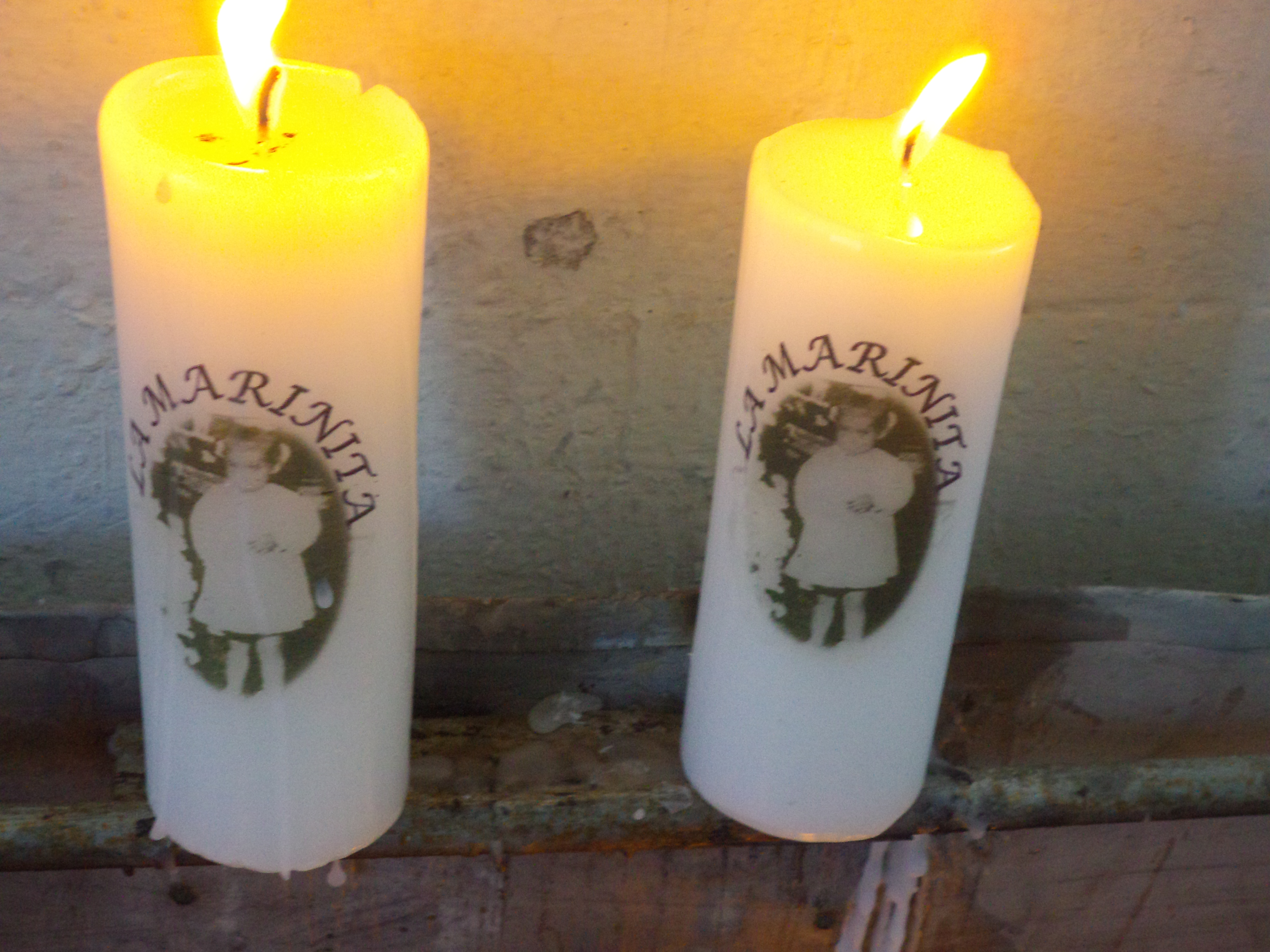 Animita o santuario para la niña Marina Silva Espinoza, asesinada bajo un àrbol del Parque O´Higgins en Santiago de Chile. Lugar de peregrinación.